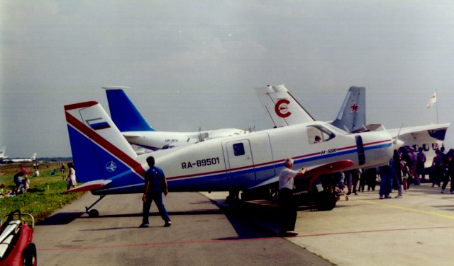 Myasishchev M-500.